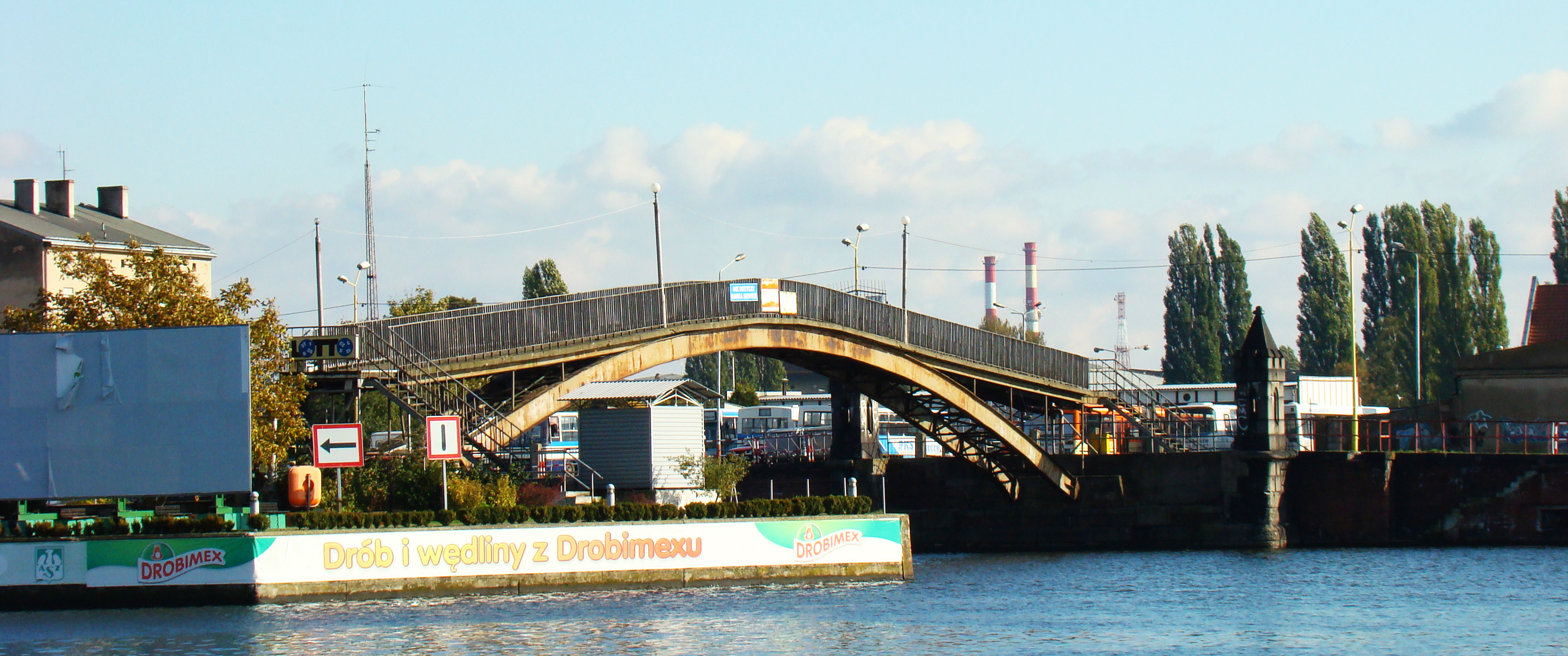 Wyspa Przymoście kładka na Kępę Parnicką (dawny Most Dworcowy), Szczecin, Polska